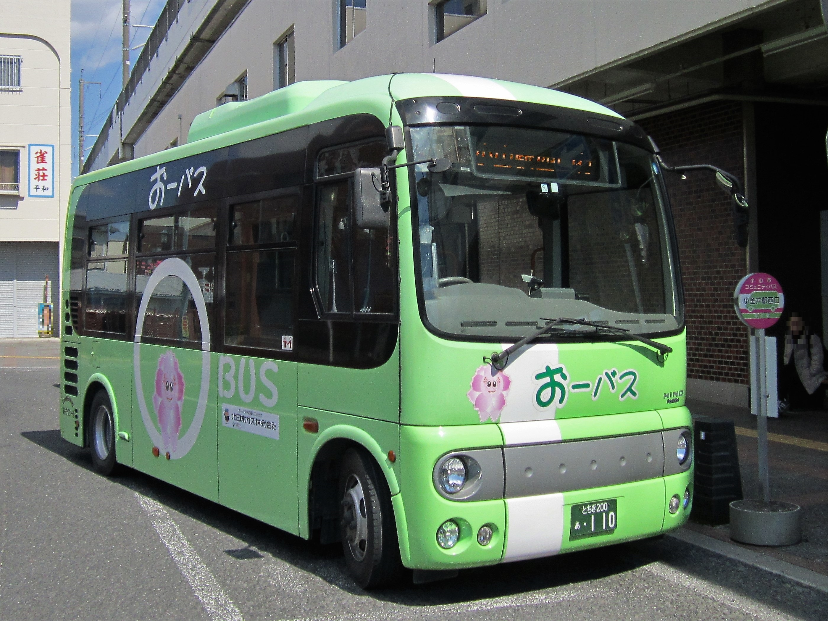 小金井駅西口に停車中のおーバス（友井タクシー） Canon PowerShot A2200